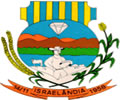 brasao